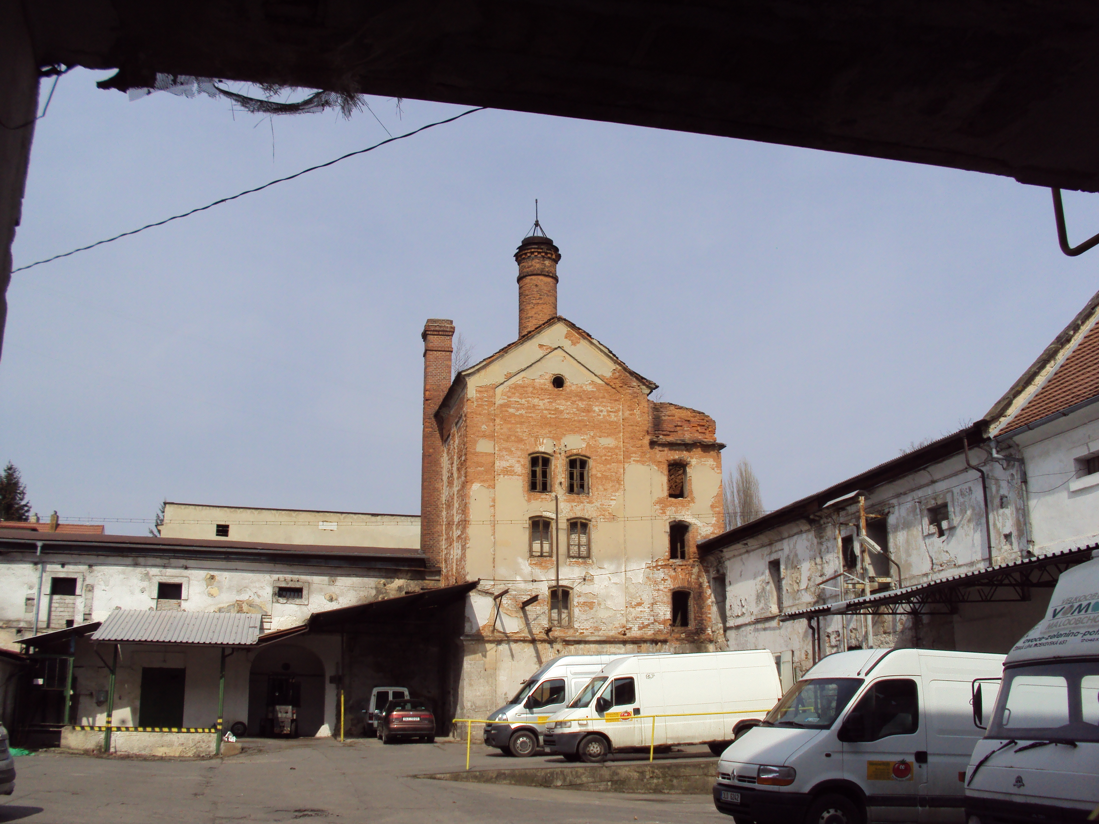 Nádvoří bývalého pivovaru v České Lípě